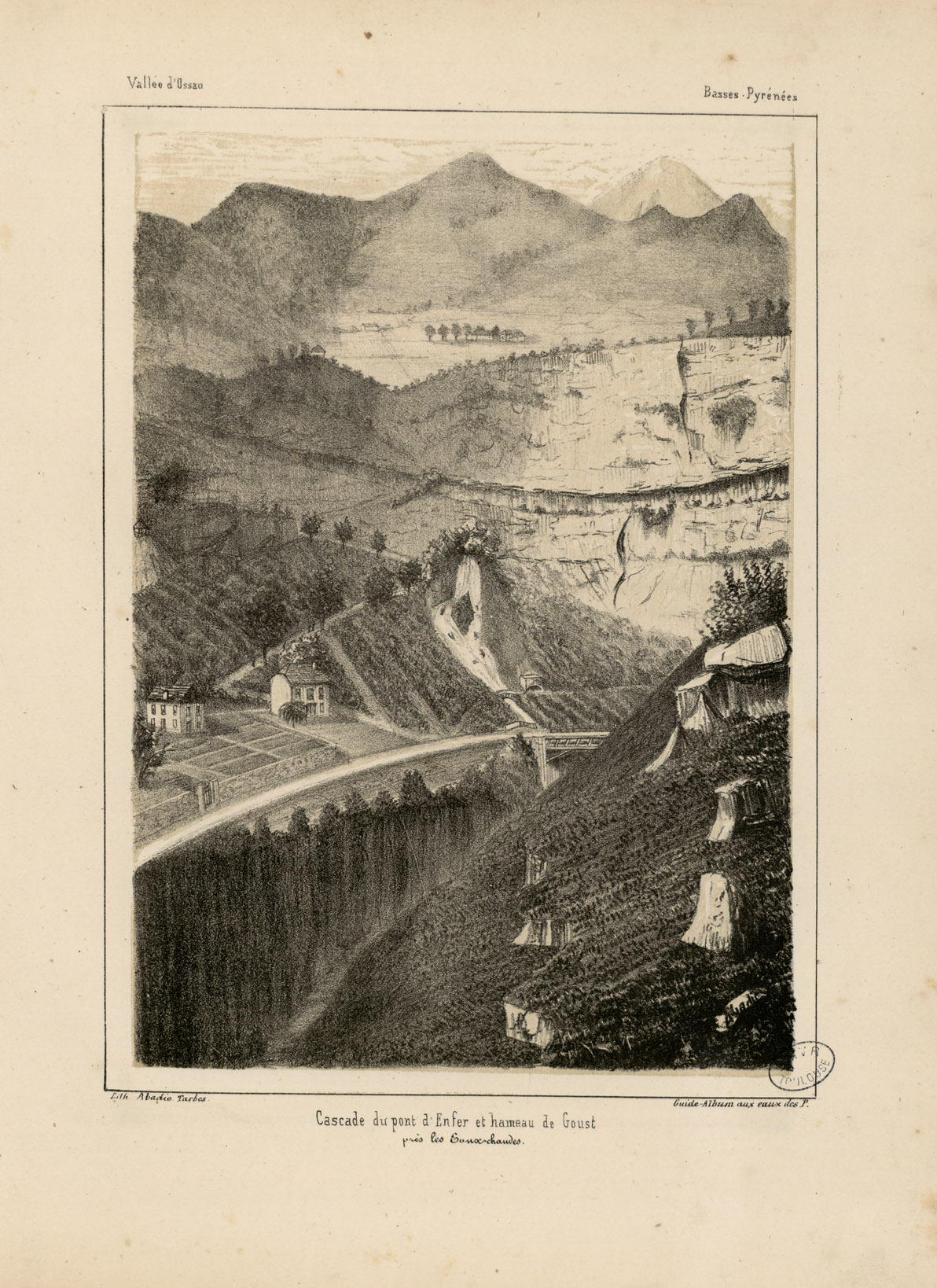 Cascade du pont d'Enfer et hameau de Goust près les Eaux-Chaudes